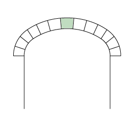 Keystone אבן הראשה